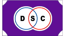 Bandera Defensor Sporting